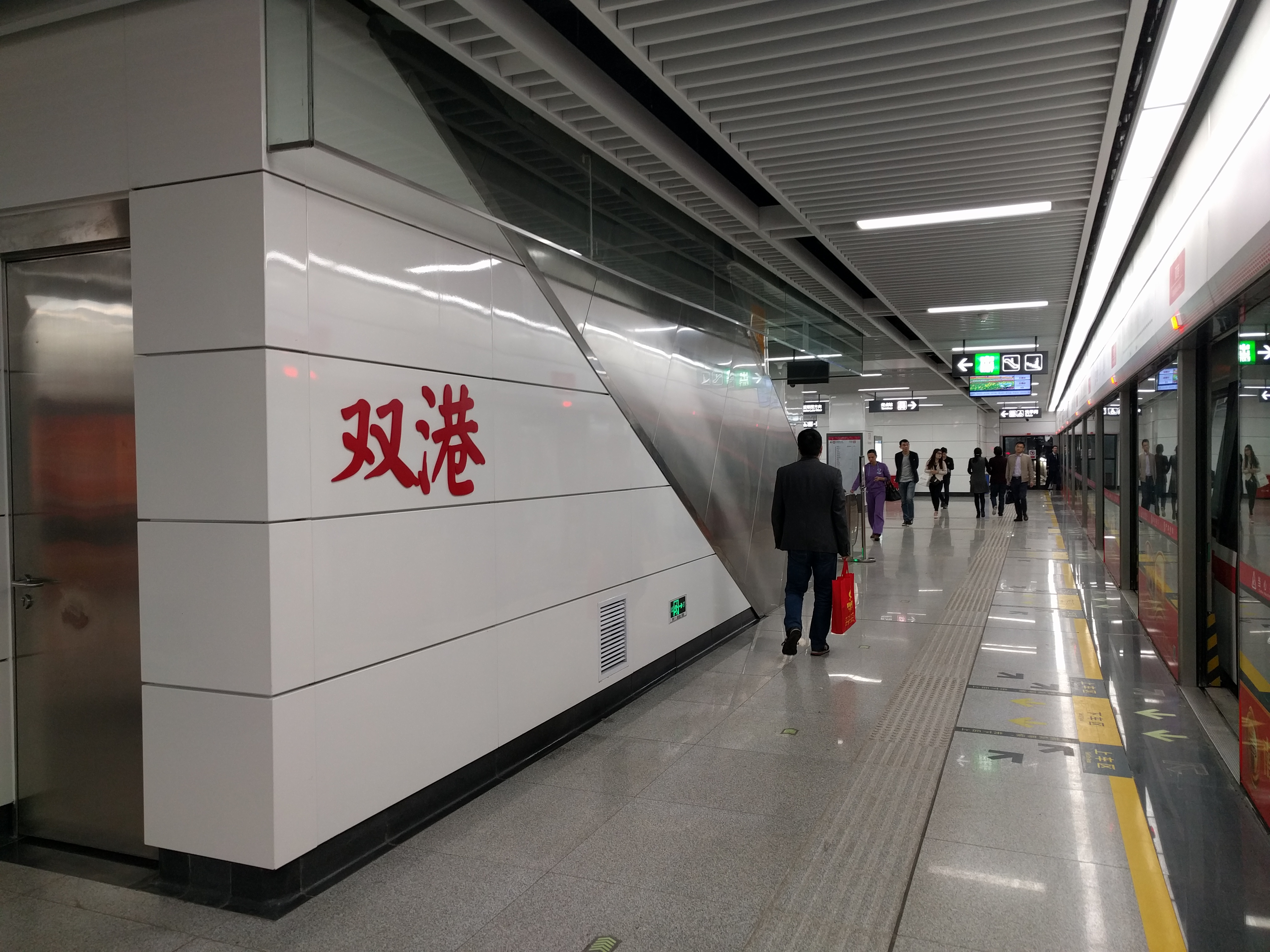 双港站下客站台